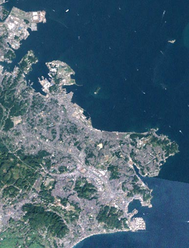 横須賀港のランドサット画像。2000年および2001年に撮影されたもの。